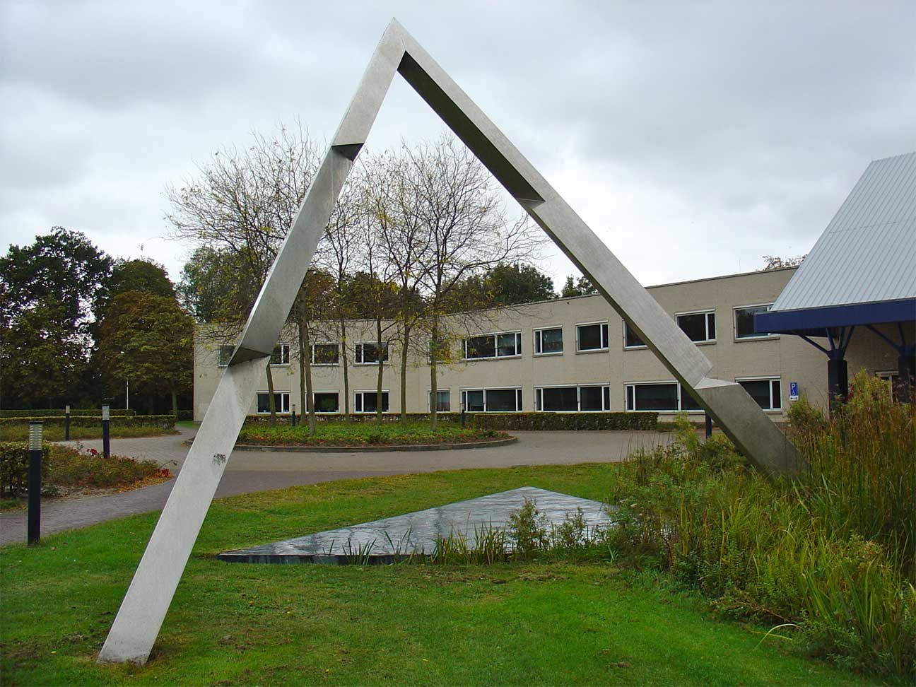 Entreeobject (1991/92) van Henk van Bennekum bij het gemeentekantoor van Teylingen Wilhelmialaan in Sassenheim